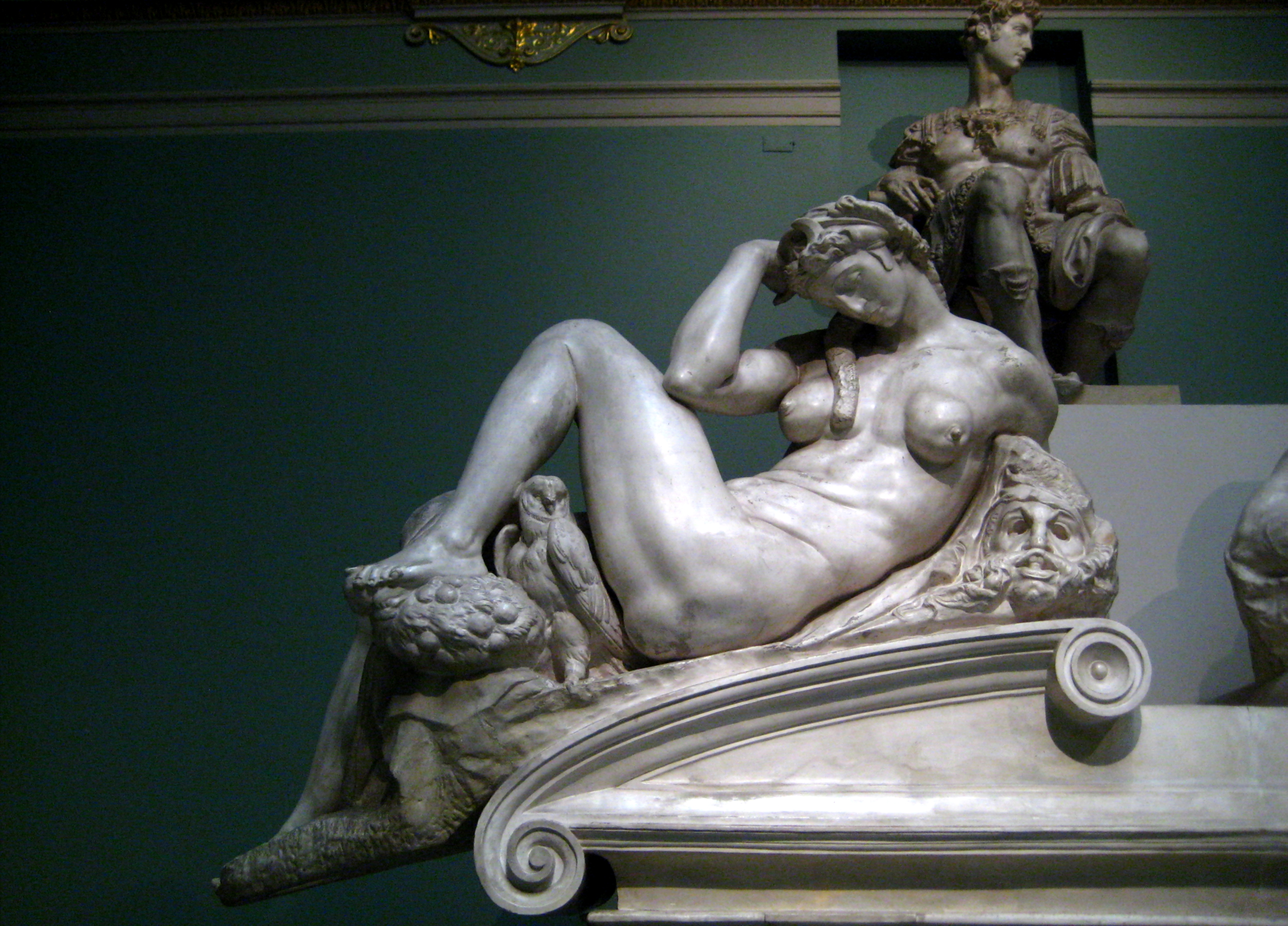 Tomb of Giuliano de' Medici